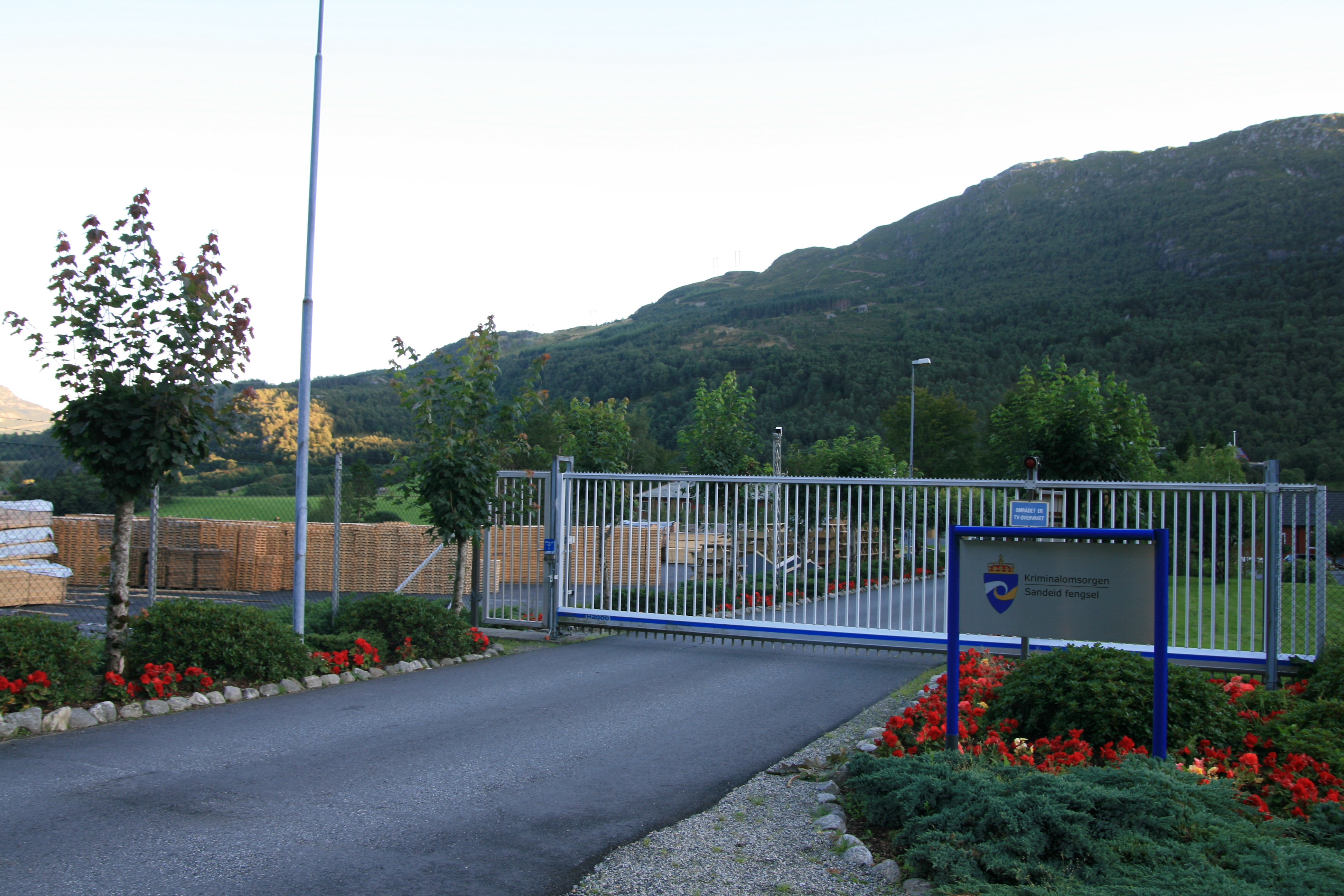 Sandeid fengsel